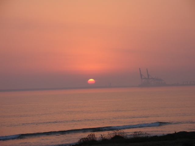 no alentejo A Natureza e a indústria no mesmo entardecer.